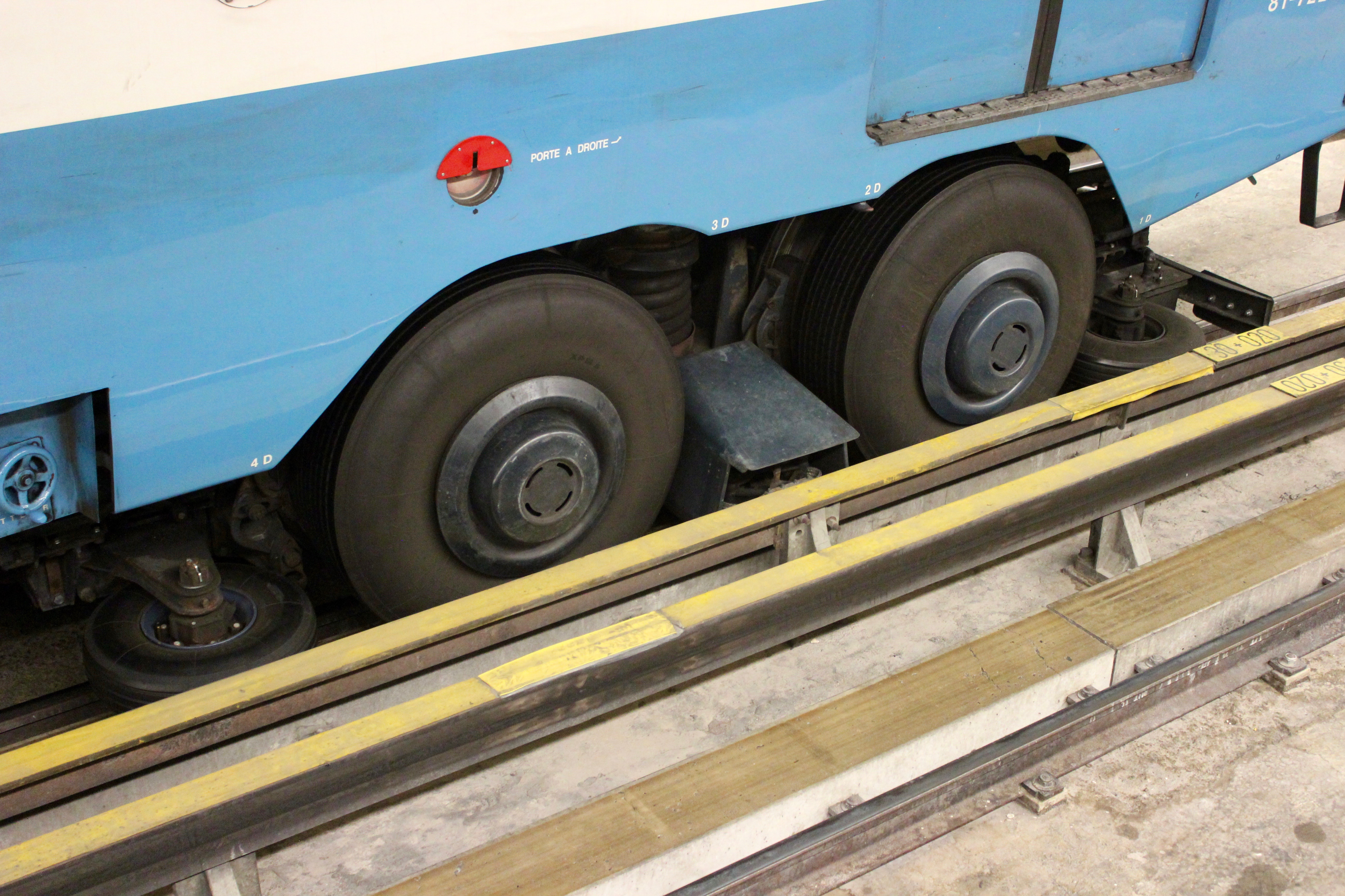 Cote d'un bogie de MR-63. On distingue les pneus porteurs, les pneus guides et les frotteurs de captation positifs.